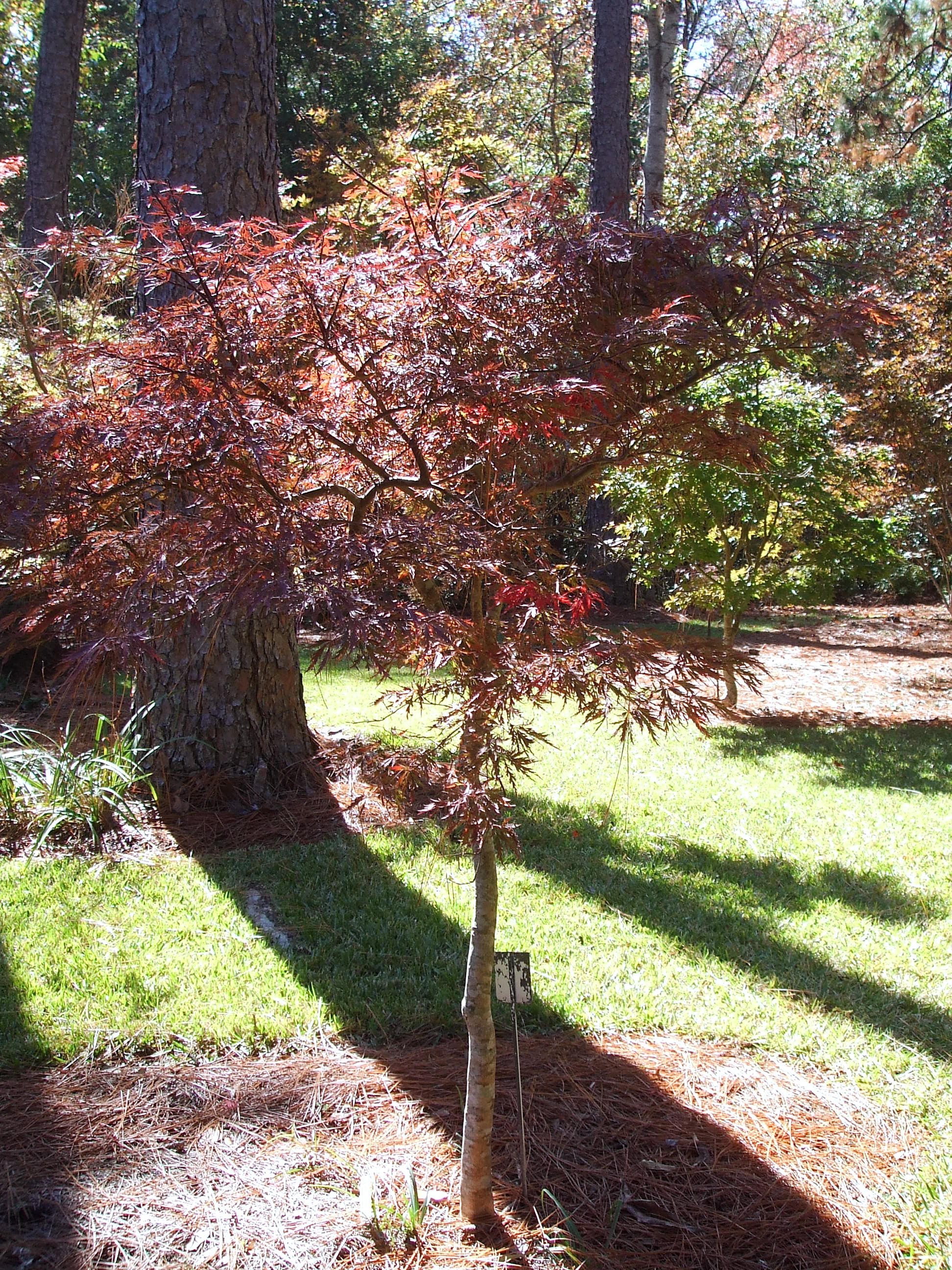 Maple